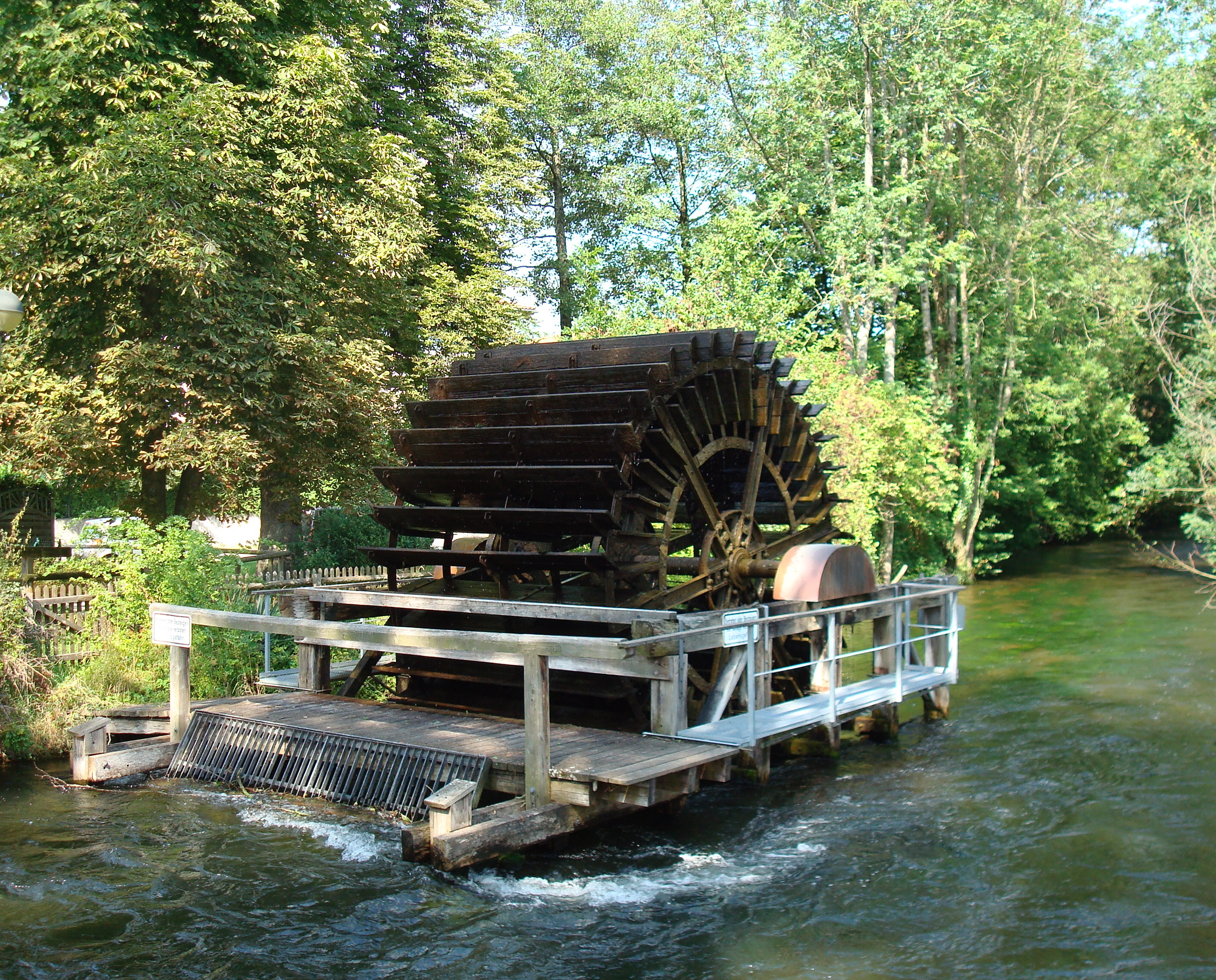 Eine Schautafel berichtet, dass dieses Wasserrad mittels einer Seiltrasse über zwei Rollenstützen in der Würm von 1878 bis um die Jahrhundertwende eine Papiermühle antrieb. Nach dem Ende des 2. Weltkrieges war es dort bis in die 60er Jahre nochmals für eine Spundfabrik in Betrieb. 1976 hat es die Gemeinde 20 Meter unterhalb des alten Standortes als Denkmal neu errichtet.